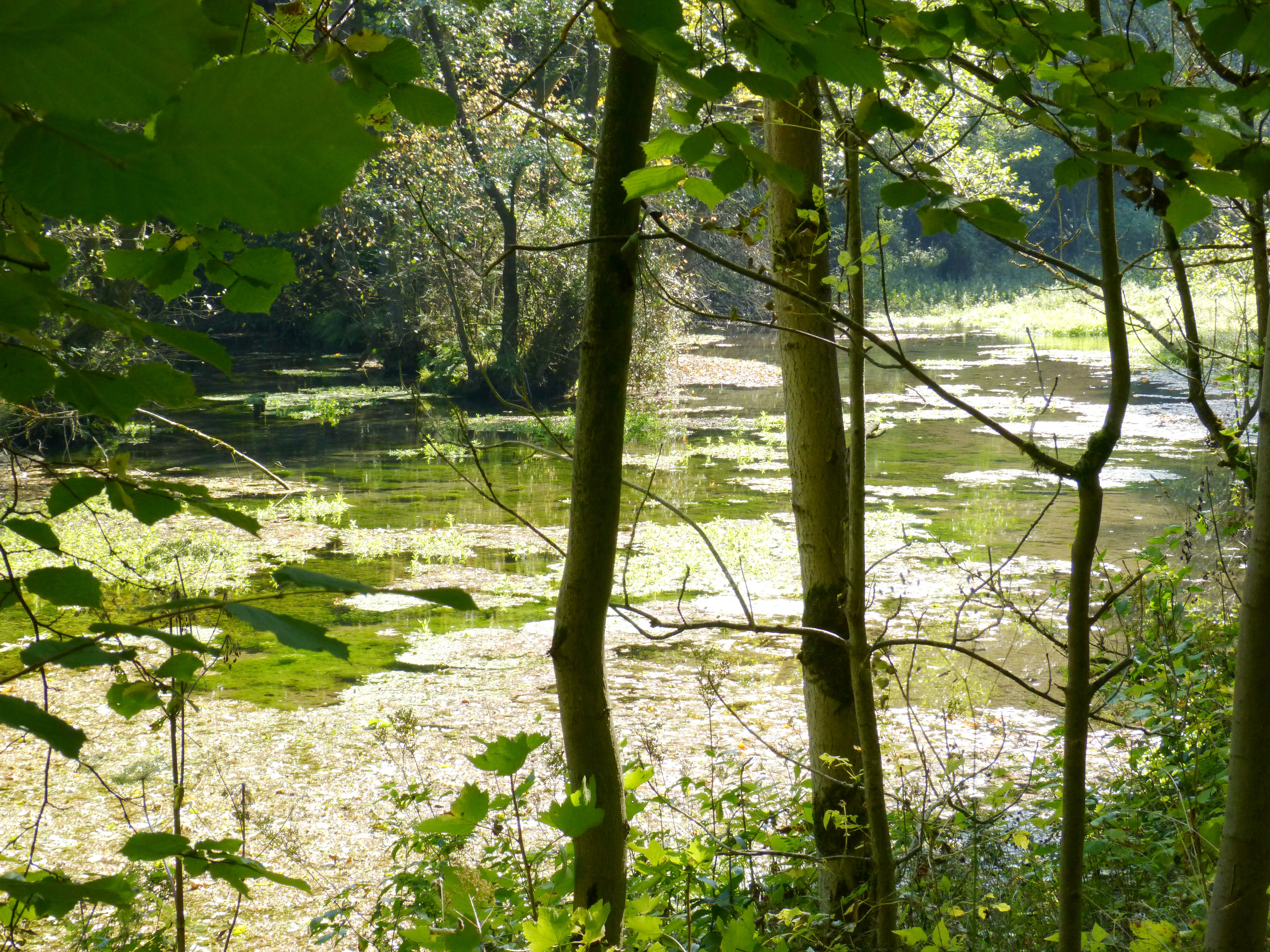 Almequellen im Naturschutzgebiet Tinne/Nehder Kopf in Brilon (NSG HSK-026 im Hochsauerlandkreis). – Eines der größten Quellgebiete Deutschlands. Hier kommen über hundert Quellen an die Oberfläche und bilden einen Quellteich mit einem Durchmesser von rund 30m.